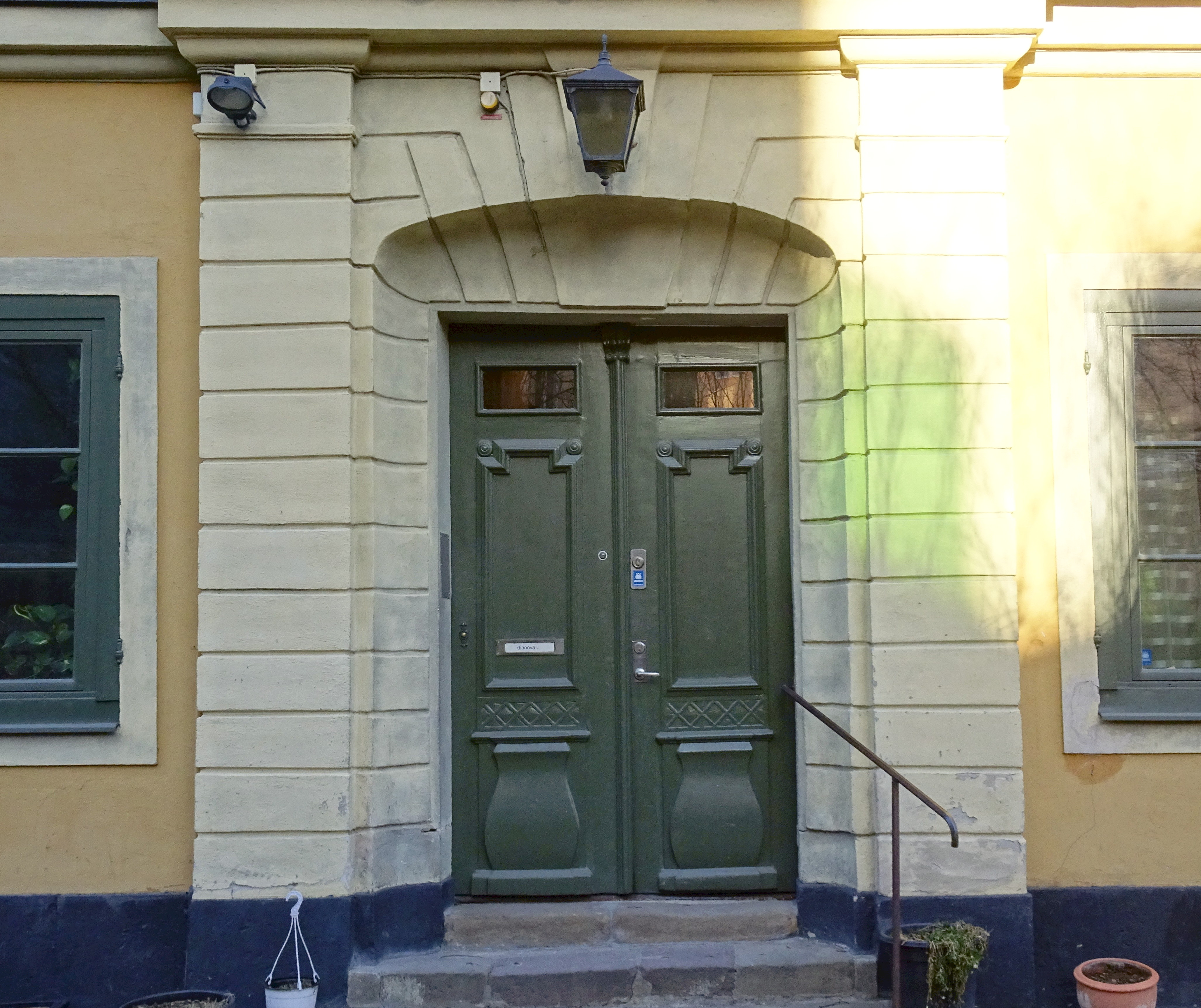 Lilla Blecktornet vid Katarina bangata